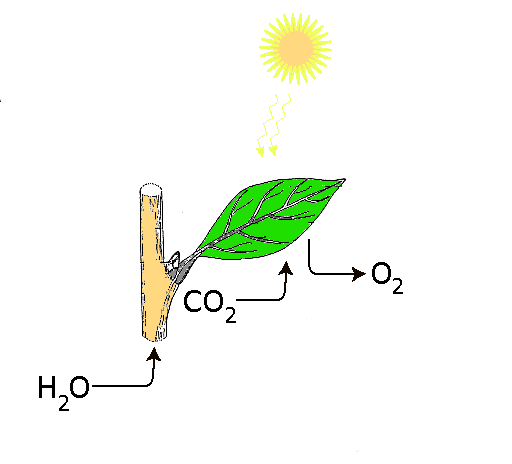 Schemat fotosyntezy